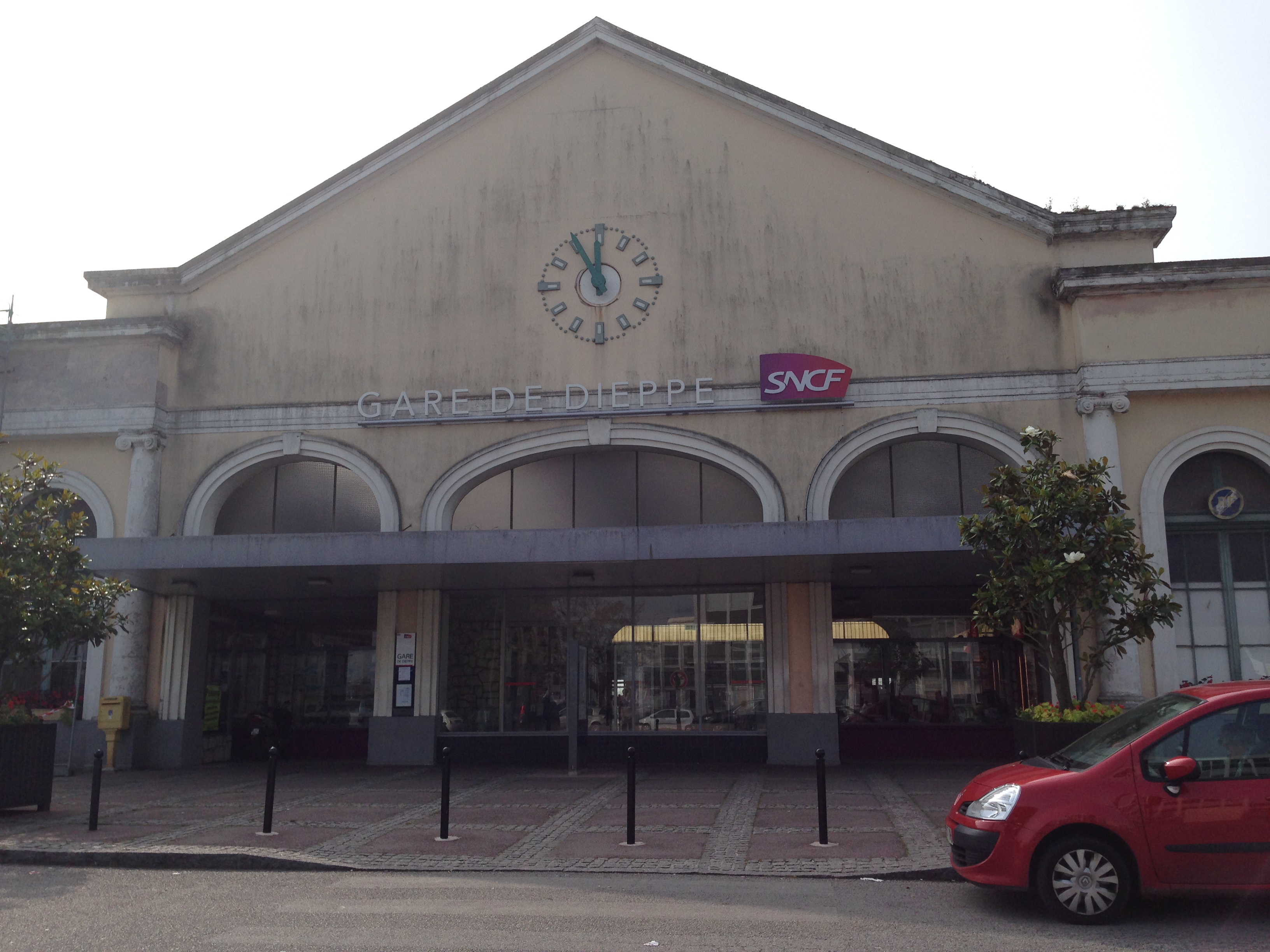 Gare de Dieppe-2014